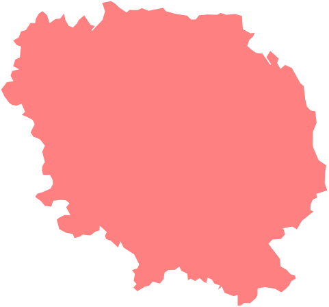 Résultats des élections législatives de la Creuse en 2012